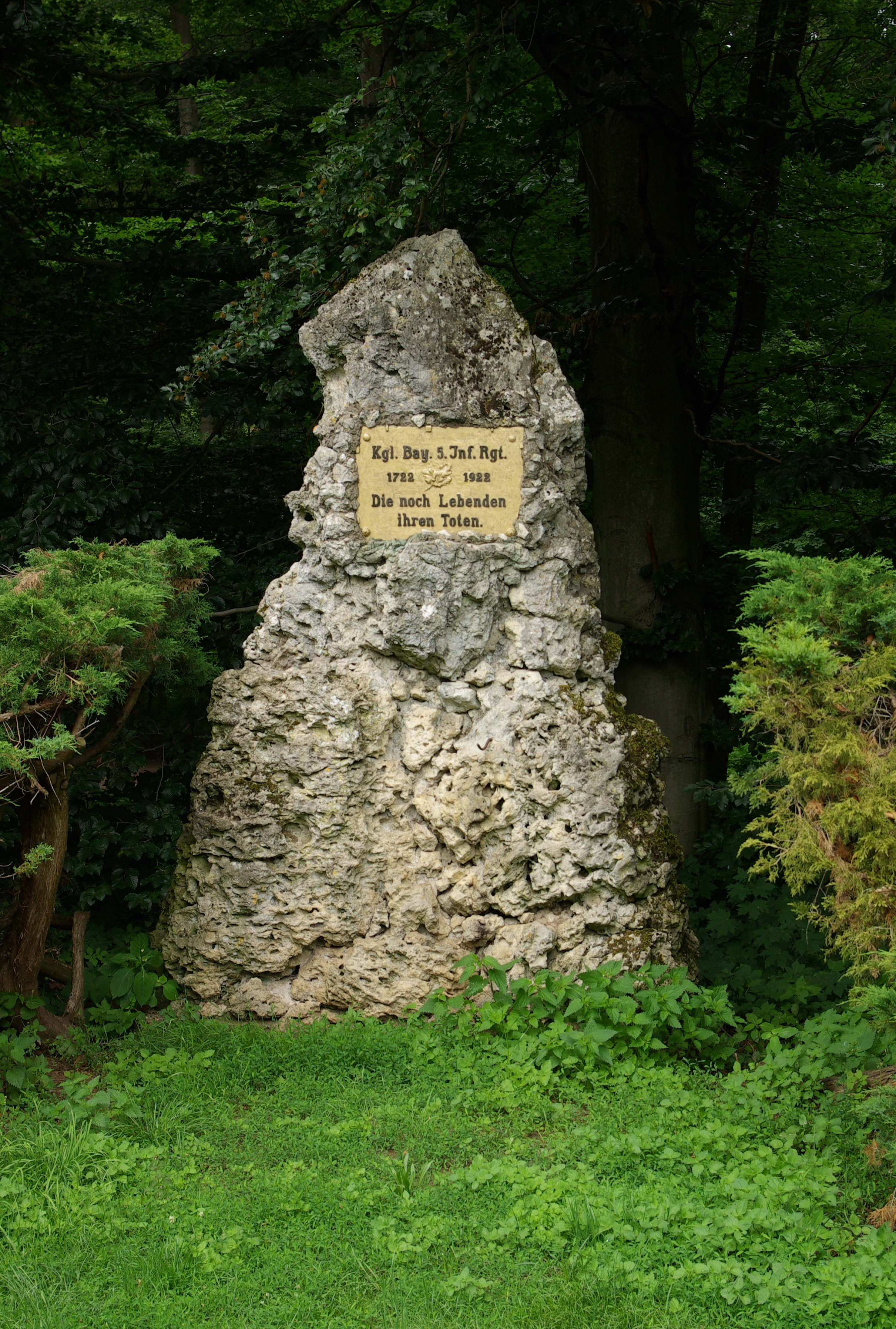 1922 errichtetes Denkmal für die Toten des 1722 gegründeten Königlich Bayerischen Infanterie-Regiments „Großherzog Ernst Ludwig von Hessen“ Nr. 5 im Bamberger Luisenhain.